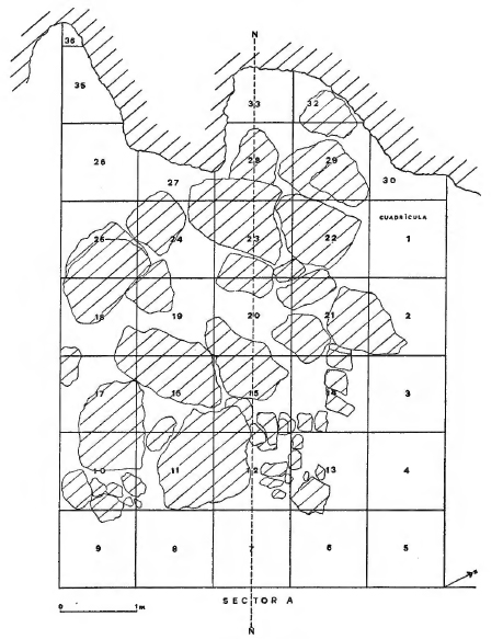 Sector A